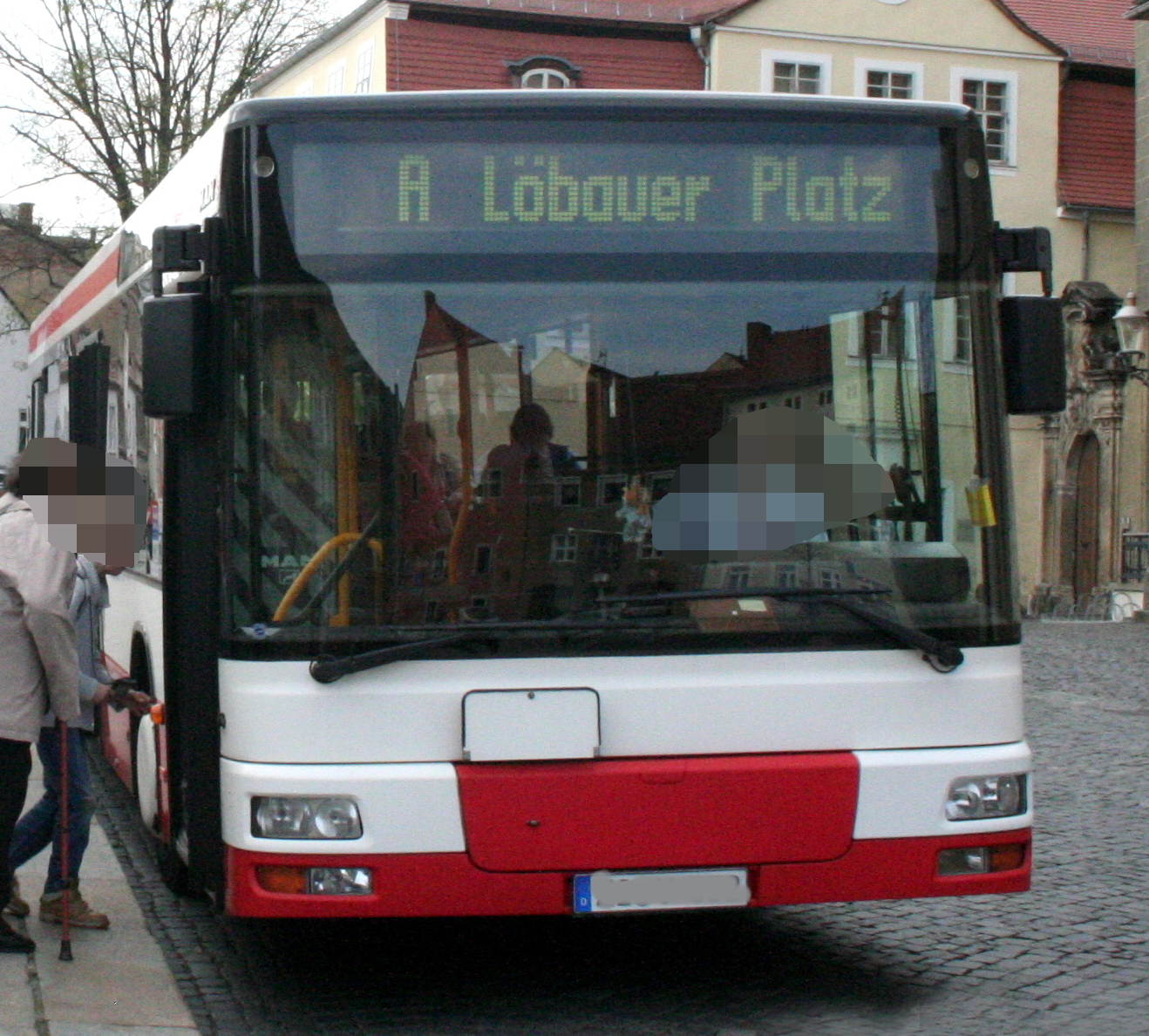 Bus der Stadtlinie A auf dem Zittauer Klosterplatz